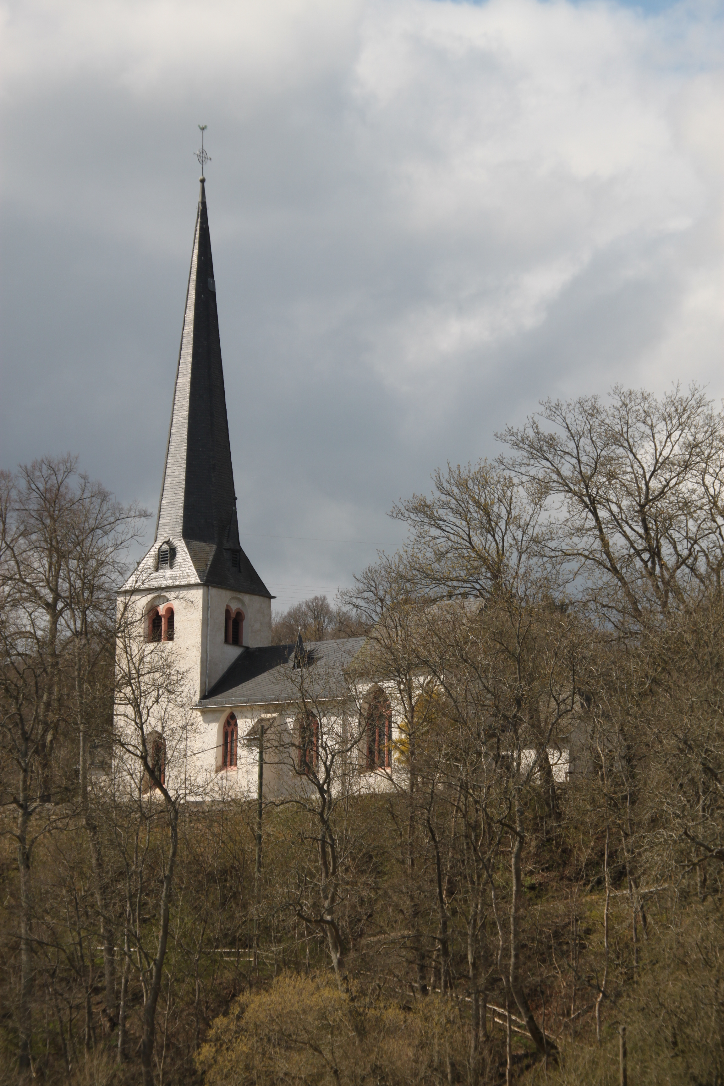 Wirft-Kirmutscheid, kath. Pfarrkirche St. Wendalinus